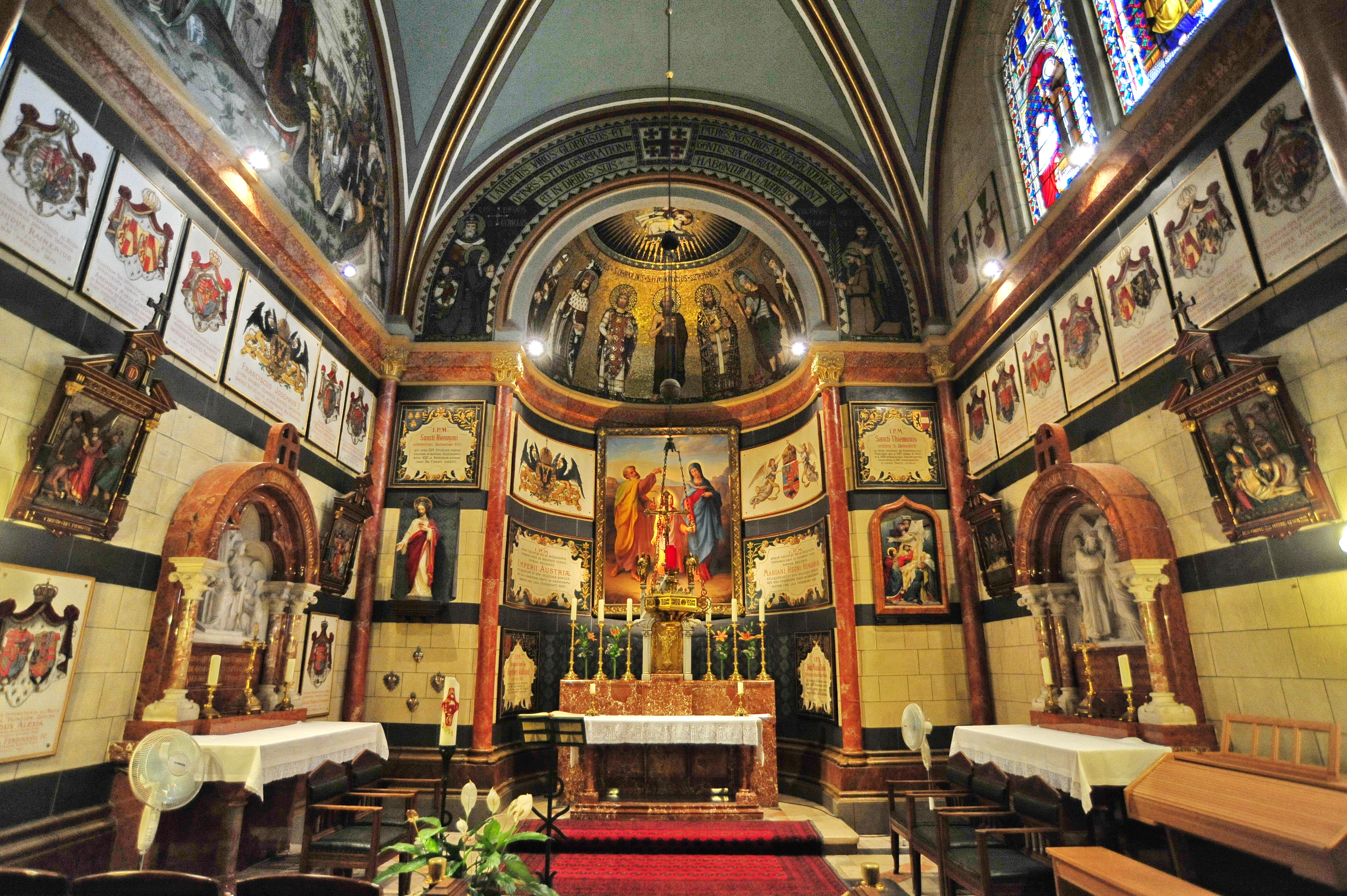 האכסניה האוסטרית בירושלים היא בית הארחה לצליינים הממוקם בפינת רחוב ויה דולורוזה ורחוב הגיא בירושלים ברובע המוסלמי של העיר העתיקה. האכסניה נבנתה בין השנים 1857 - 1869 ותוכננה על ידי האדריכל אנטון אנדליכר כאכסניה לצליינים נוצריים שבאו מאוסטריה.